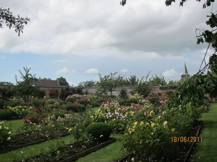 Plus de 530 variétés différentes